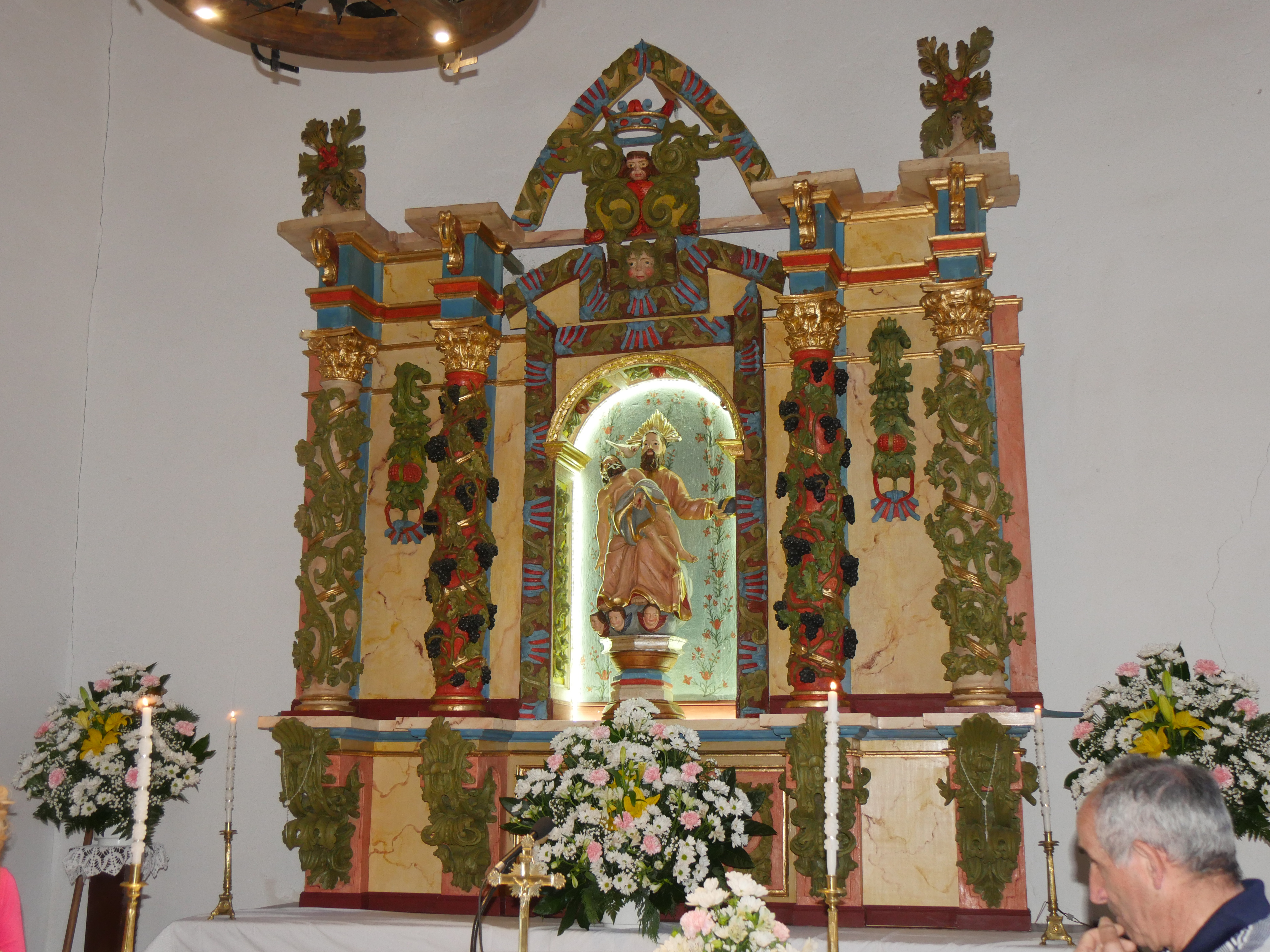 Trinidad camarzana